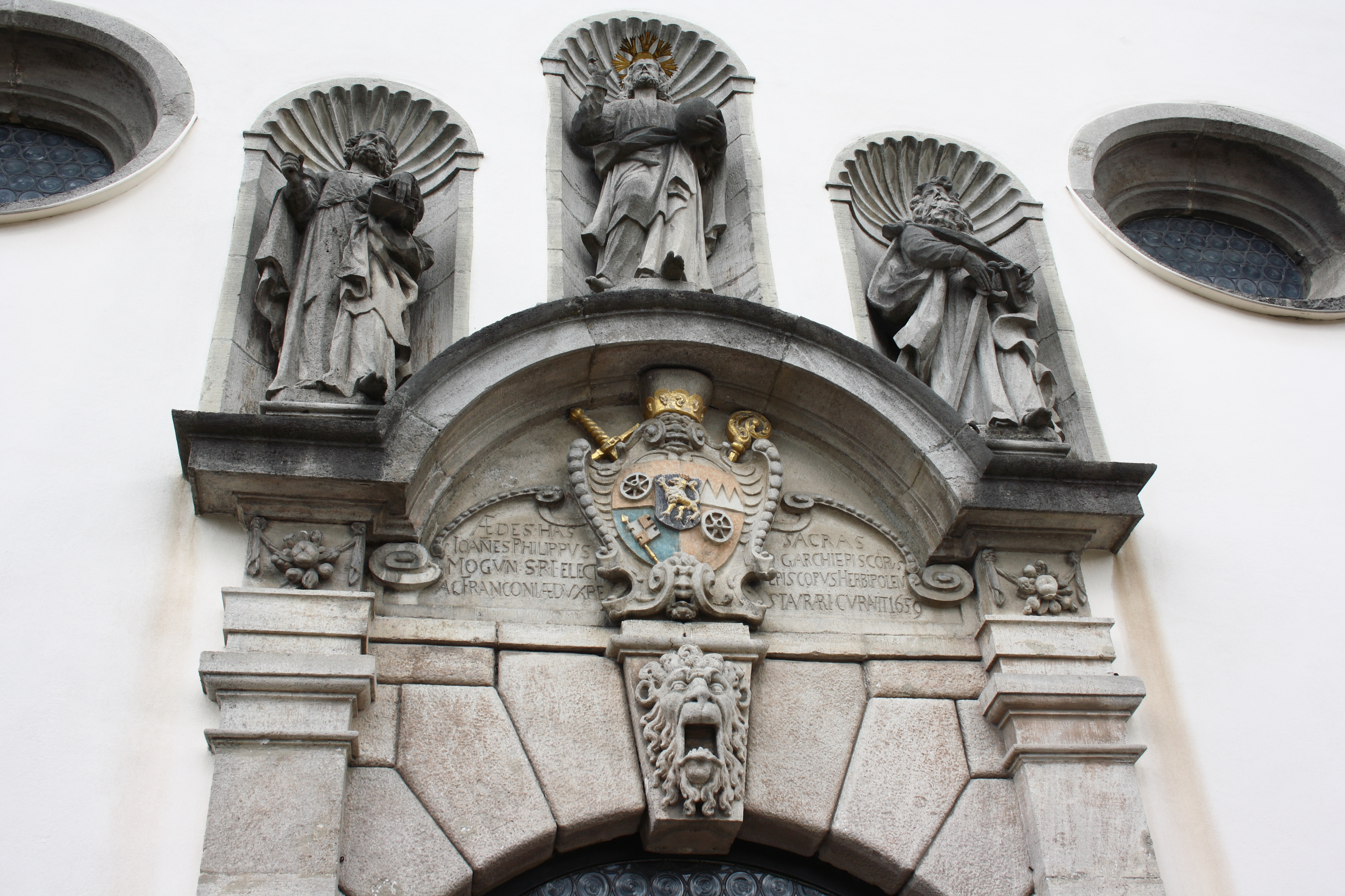 katholische Stadtpfarrkirche St. Peter und Paul in Grünsfeld im Main-Tauber-Kreis (Baden-Württemberg), Hauptstraße 18